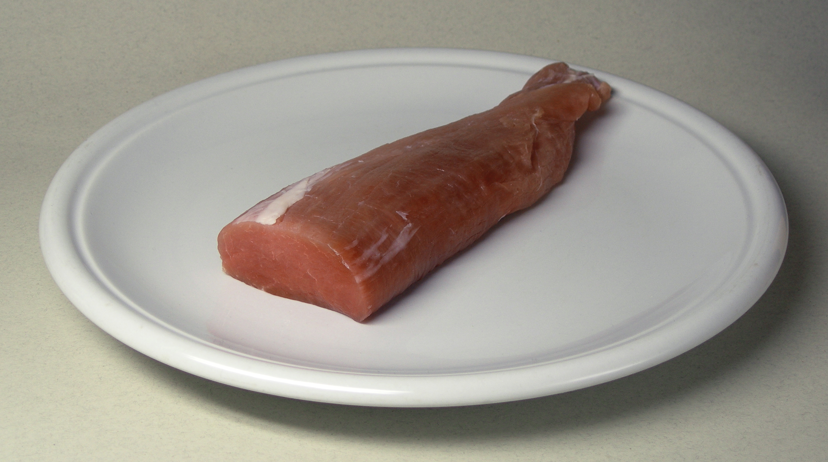 Pork fillet